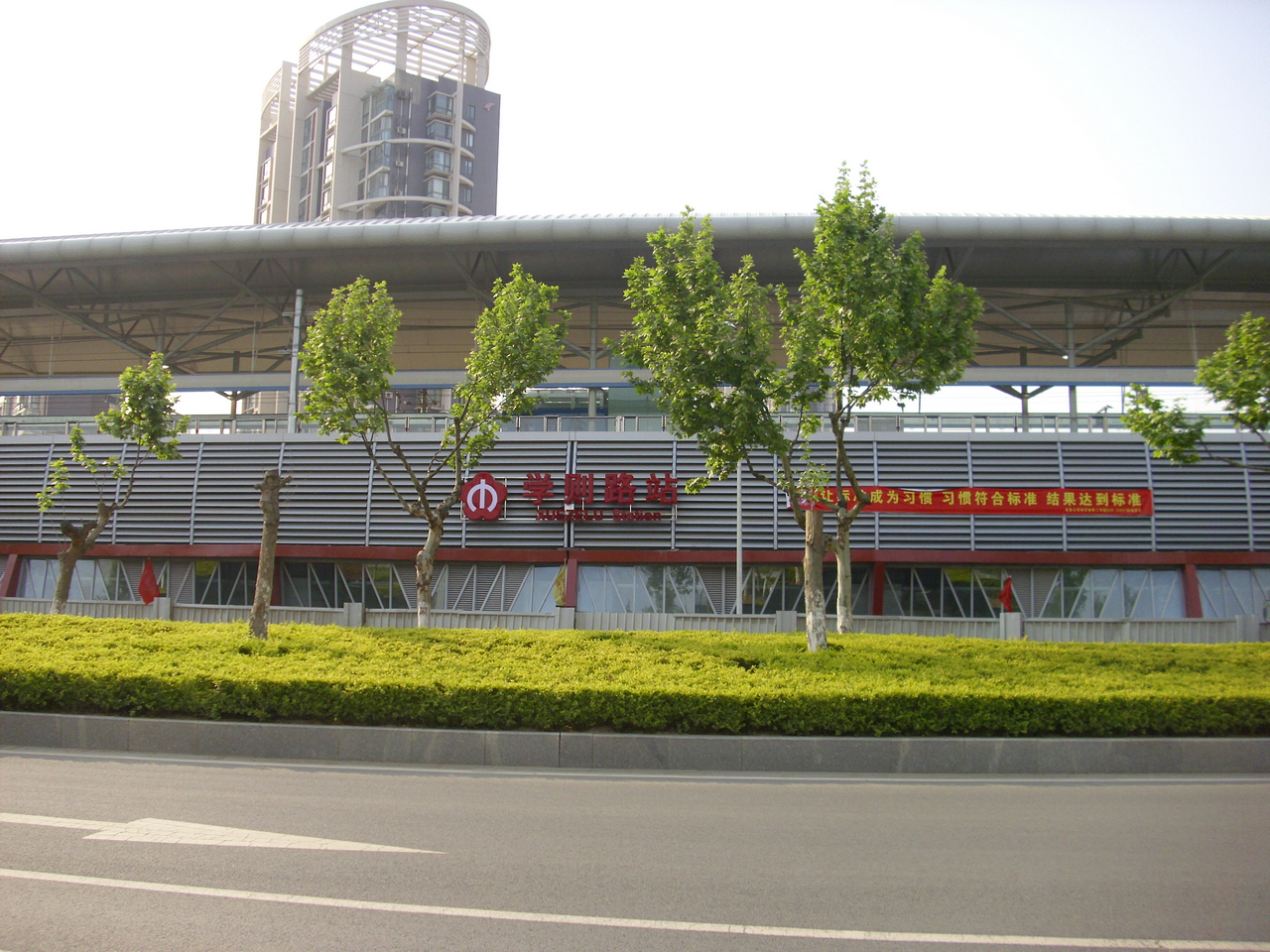 南京地铁2号线 学则路站